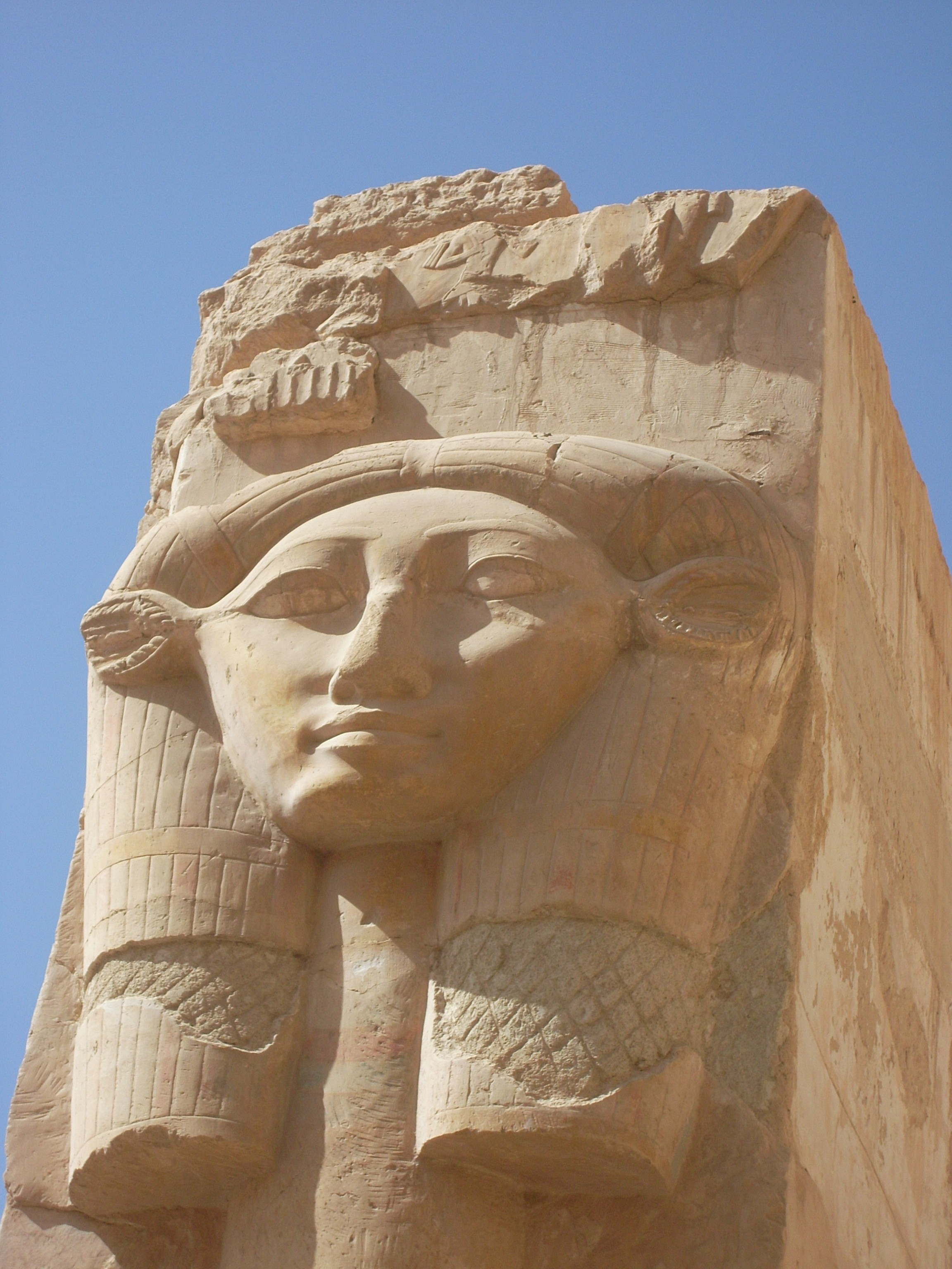 Templo funerario de Hatshepsut, Hathor (detalle), Egipto, abril de 2009